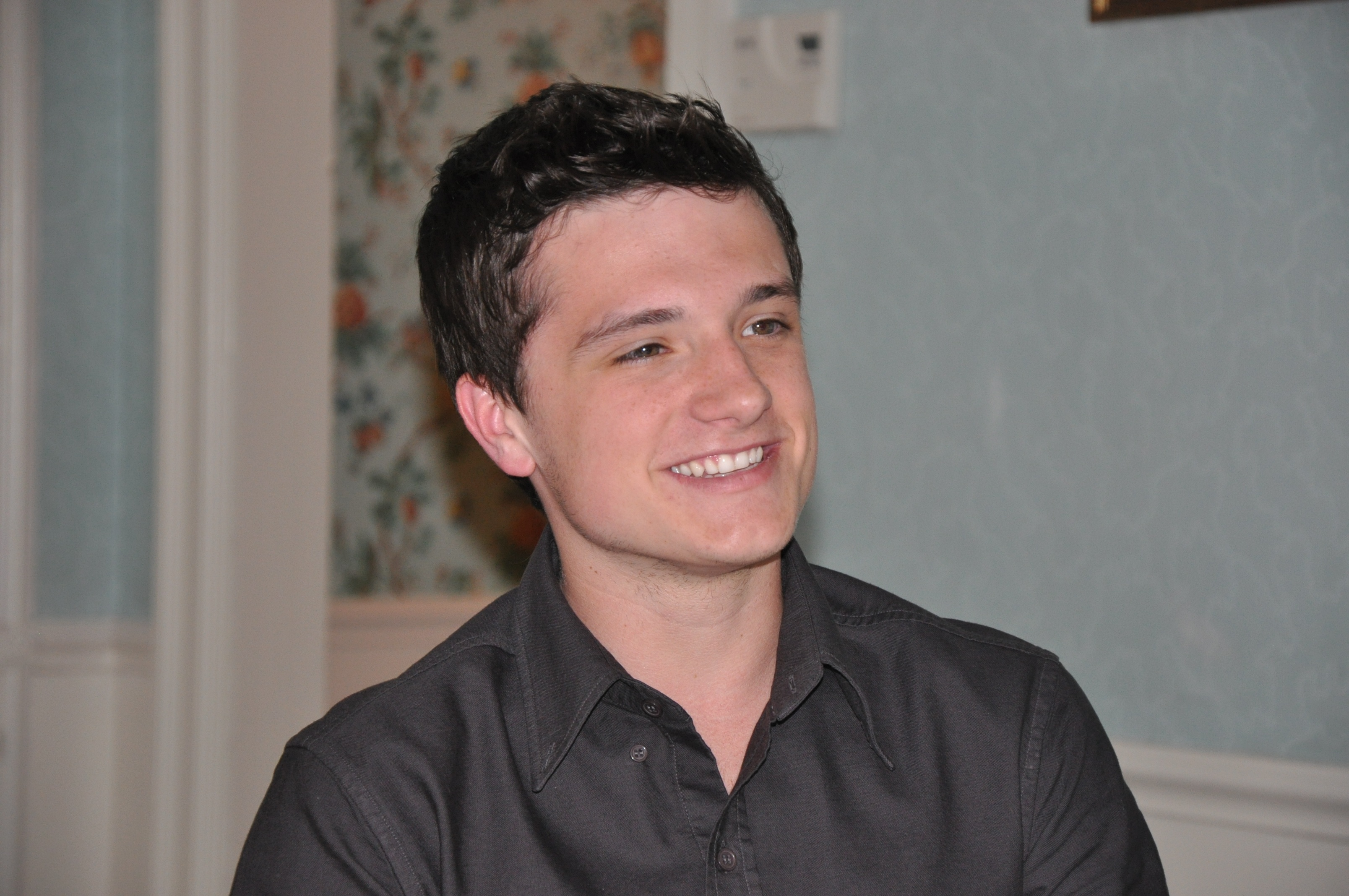 El actor Josh Hutcherson en el Festival de Cine de Nueva York 2010.